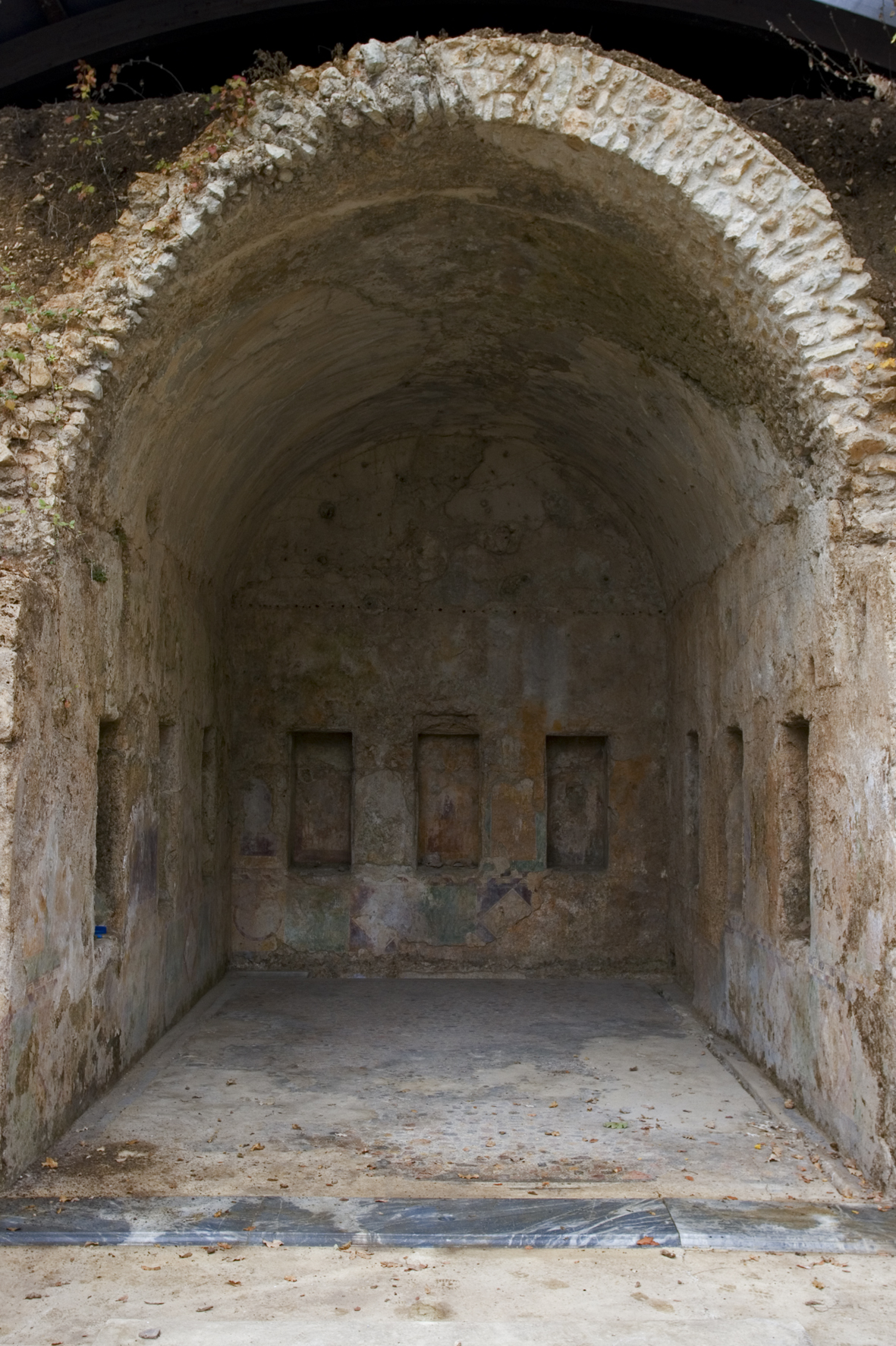 Ninfeo Ponari dela città di Casinum (I secolo a. C.)